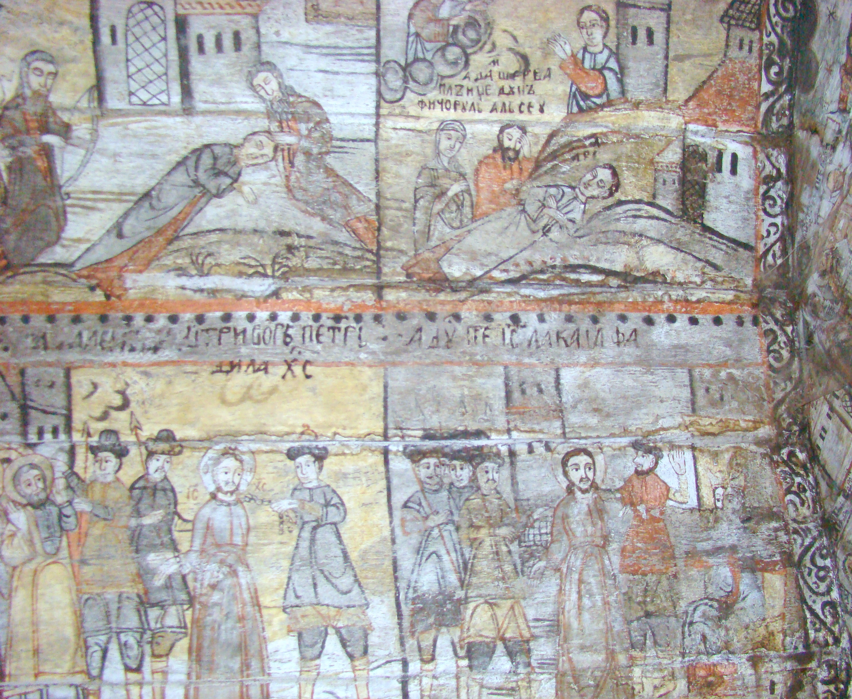 Biserica de lemn „Nașterea Maicii Domnului” din Călinești-Căeni, județul Maramureș